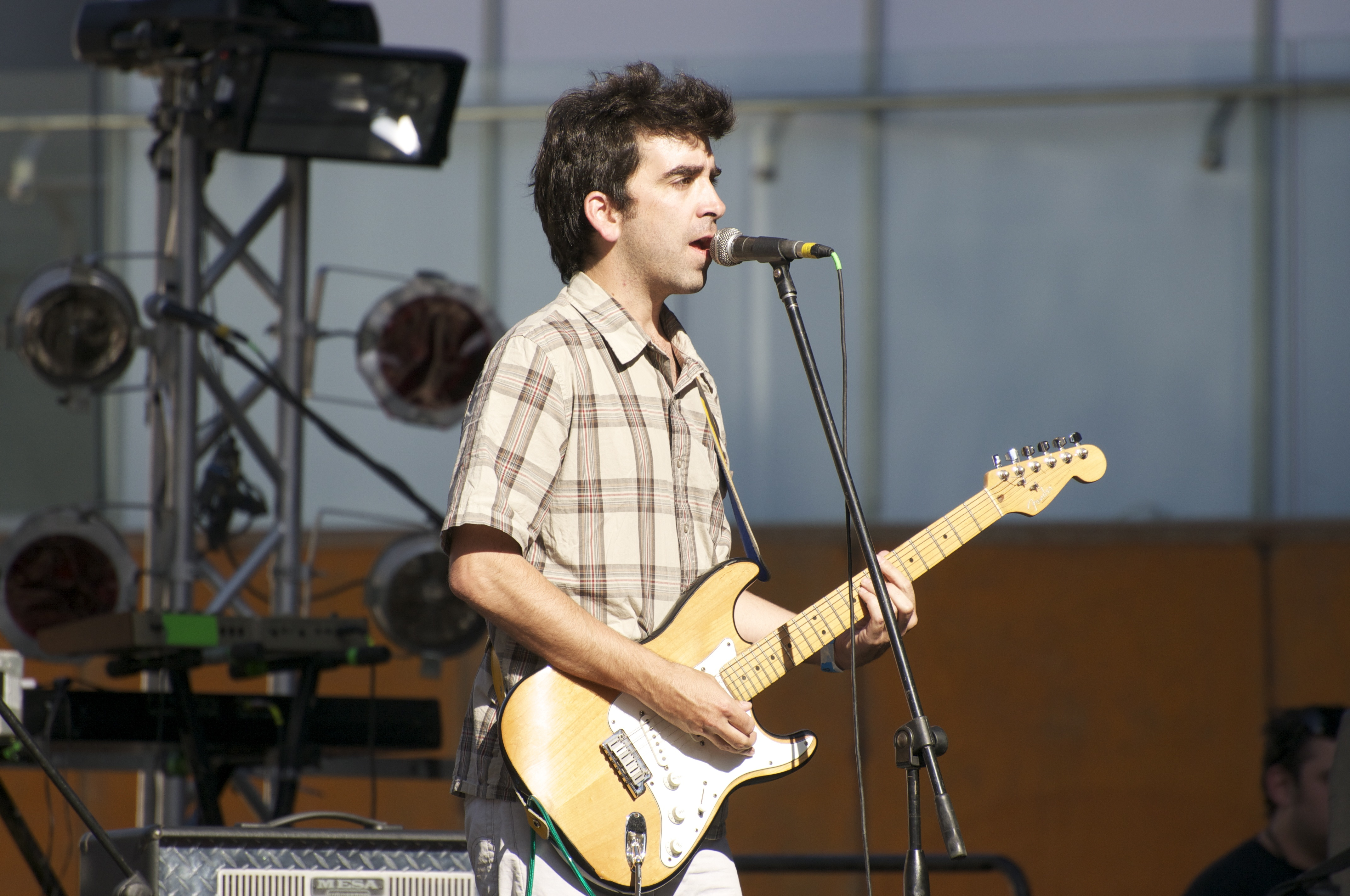 Pedro Piedra en vivo en el evento Pulsar, Chile.